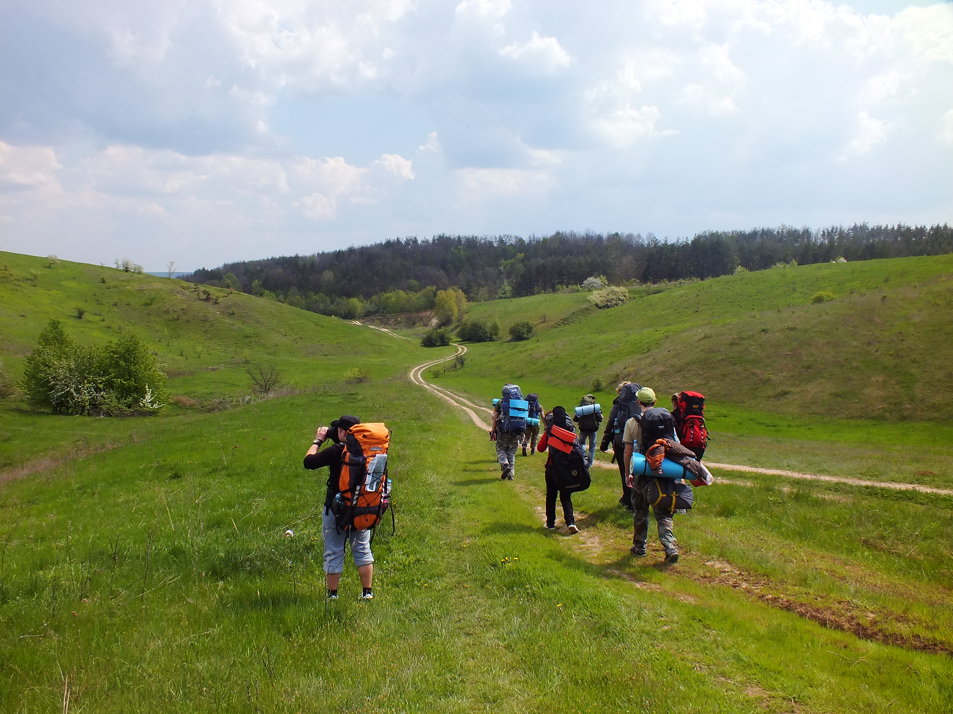 «Слобожанський», Краснокутський район